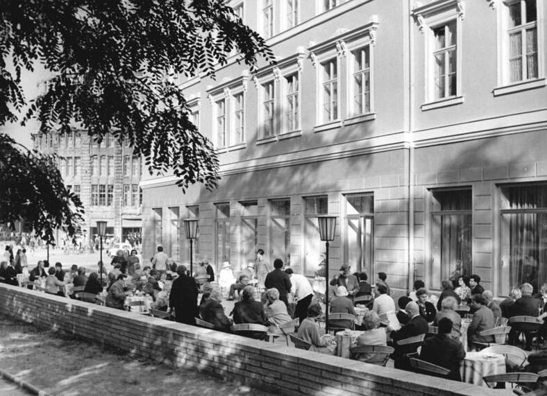 Leipzig, Café Zentralbild Kluge Bgm-Sz 4.9.1964 Leipziger Herbstmesse 1964 Neues Café am Brühl Blick auf die Terrasse des neuen "Café am Brühl" in Leipzig, das bereits jetzt für viele Leipziger und ihre Gäste zu einem Anziehungspunkt geworden ist.